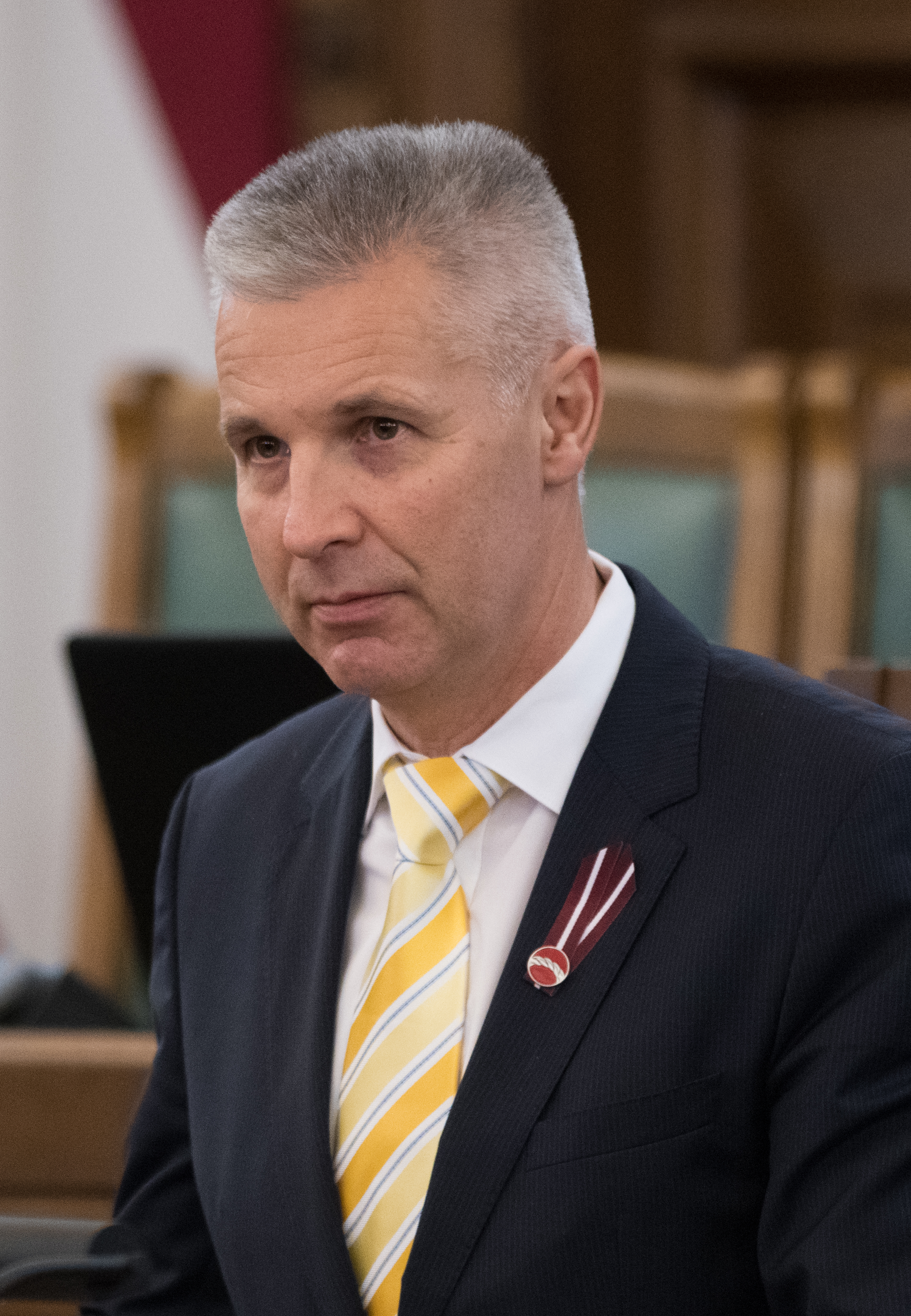 2018.gada 6.novembris. Deputāts Artis Pabriks dod svinīgo solījumu. Foto: Ieva Ābele, Saeima Izmantošanas noteikumi: saeima.lv/lv/autortiesibas